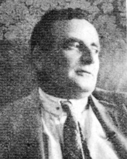 Sebestyén Géza magyar színész, színigazgató